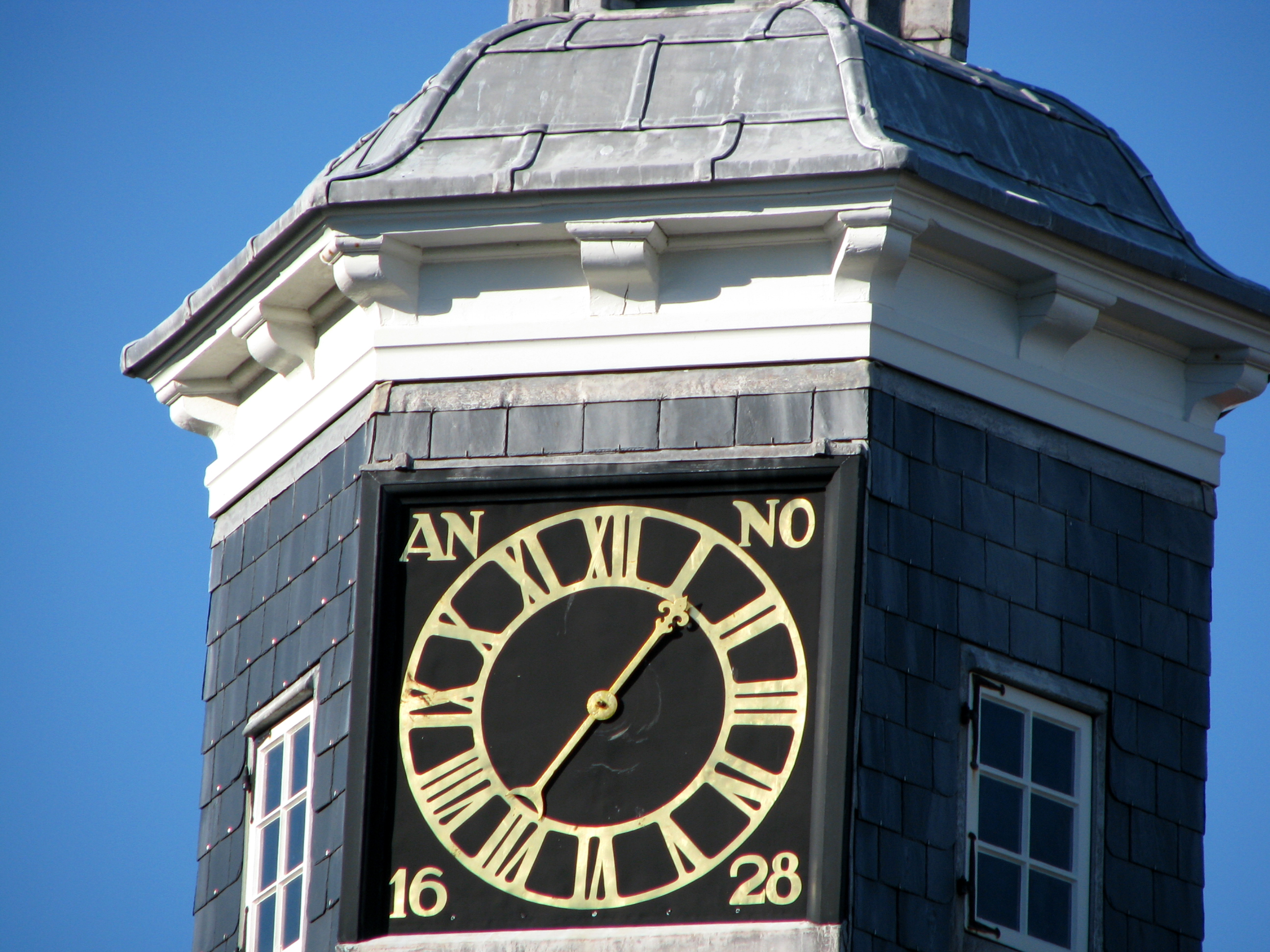 Vlissingen, Beursgebouw detail; klok op toren